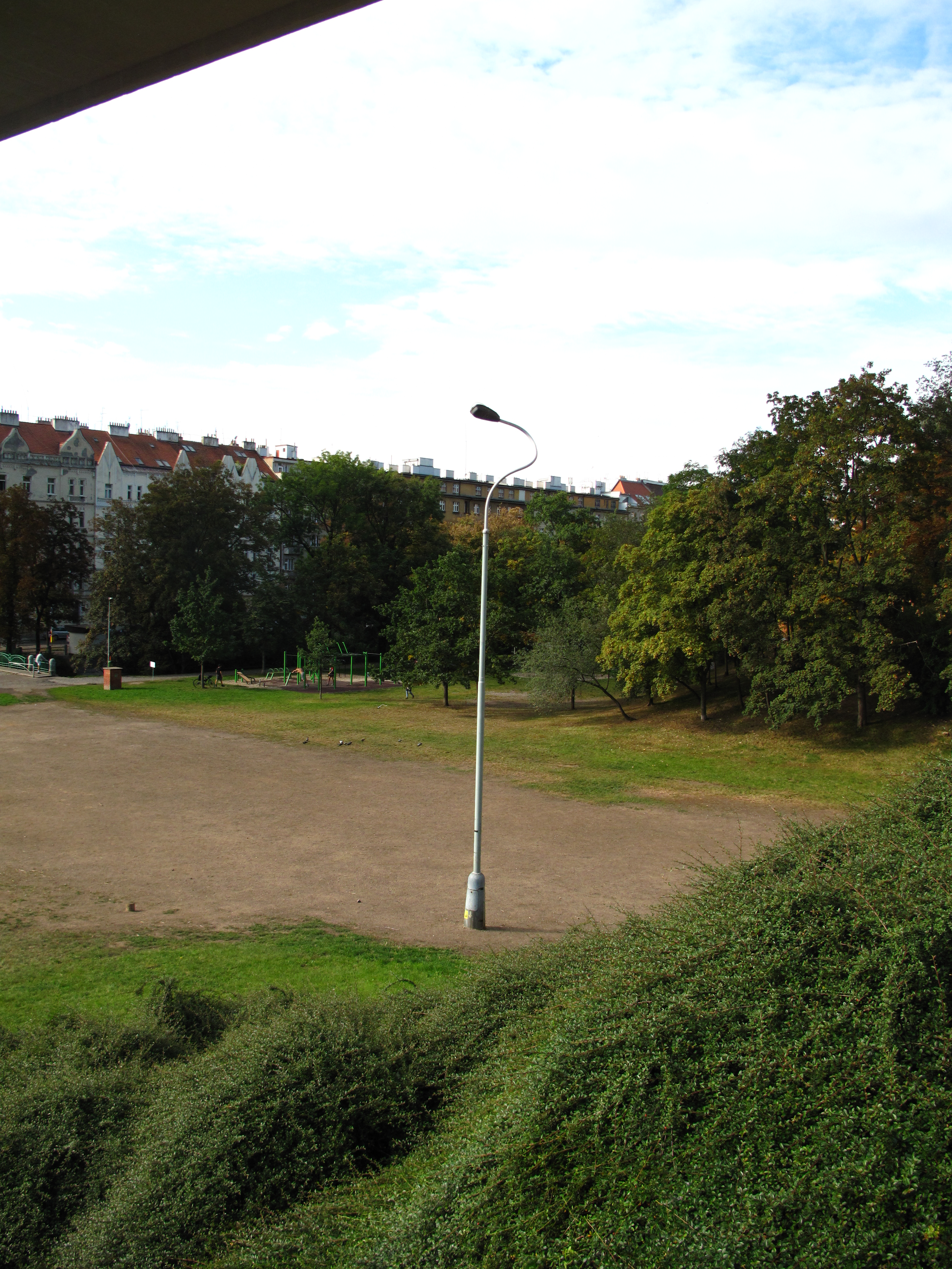 Socha Z vlastního rozhodnutí Krištofa Kintery pod Nuselským mostem na pražské Folimance.